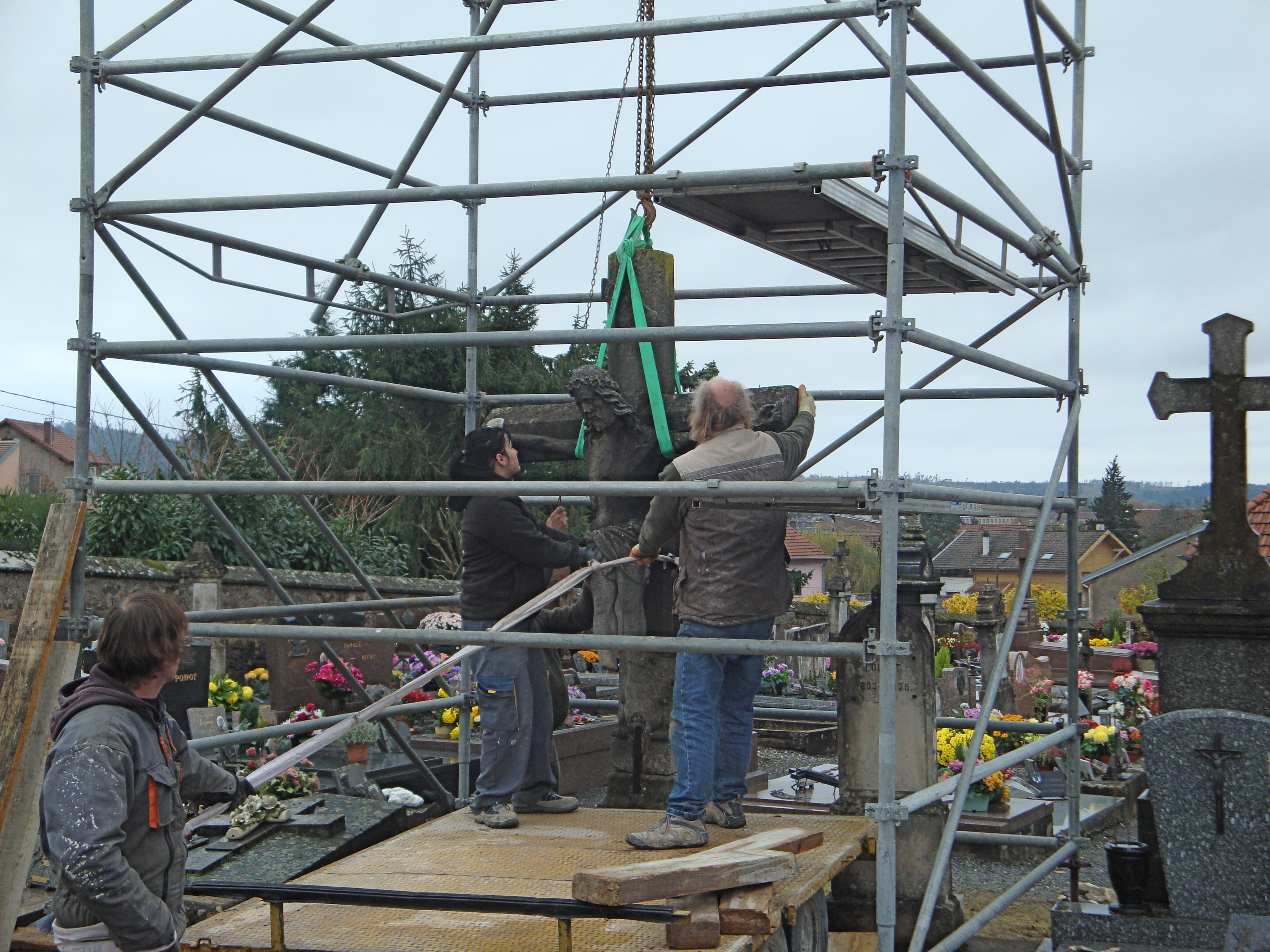 dépose de la Croix Notre-Dame du cimetière de Raon-l'Étape (88110)